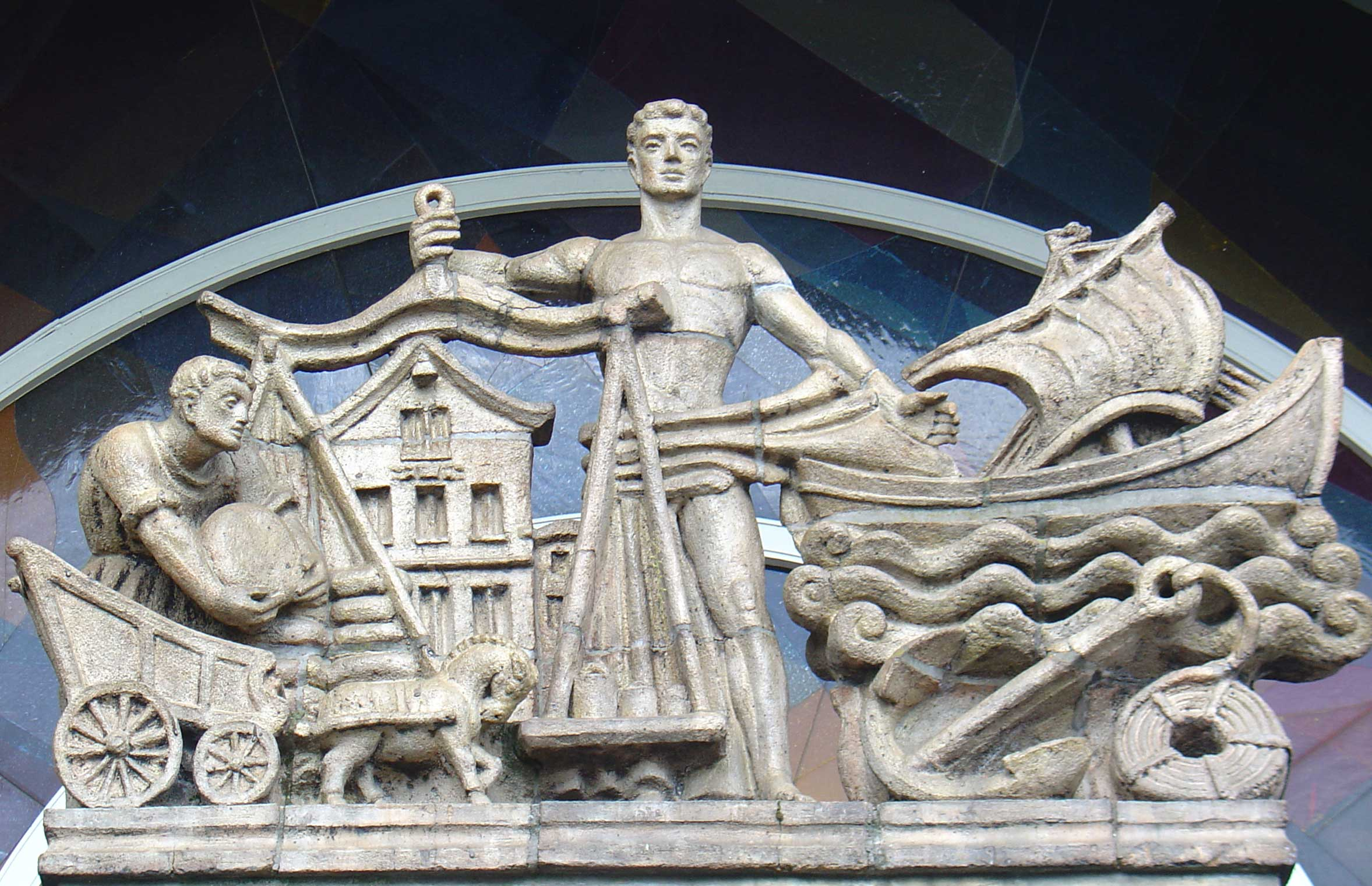 Beeldengroep (gebakken grès-aardewerk, 1949, herplaatst in 1984) Station Gouda (deel) door Jo Uiterwaal